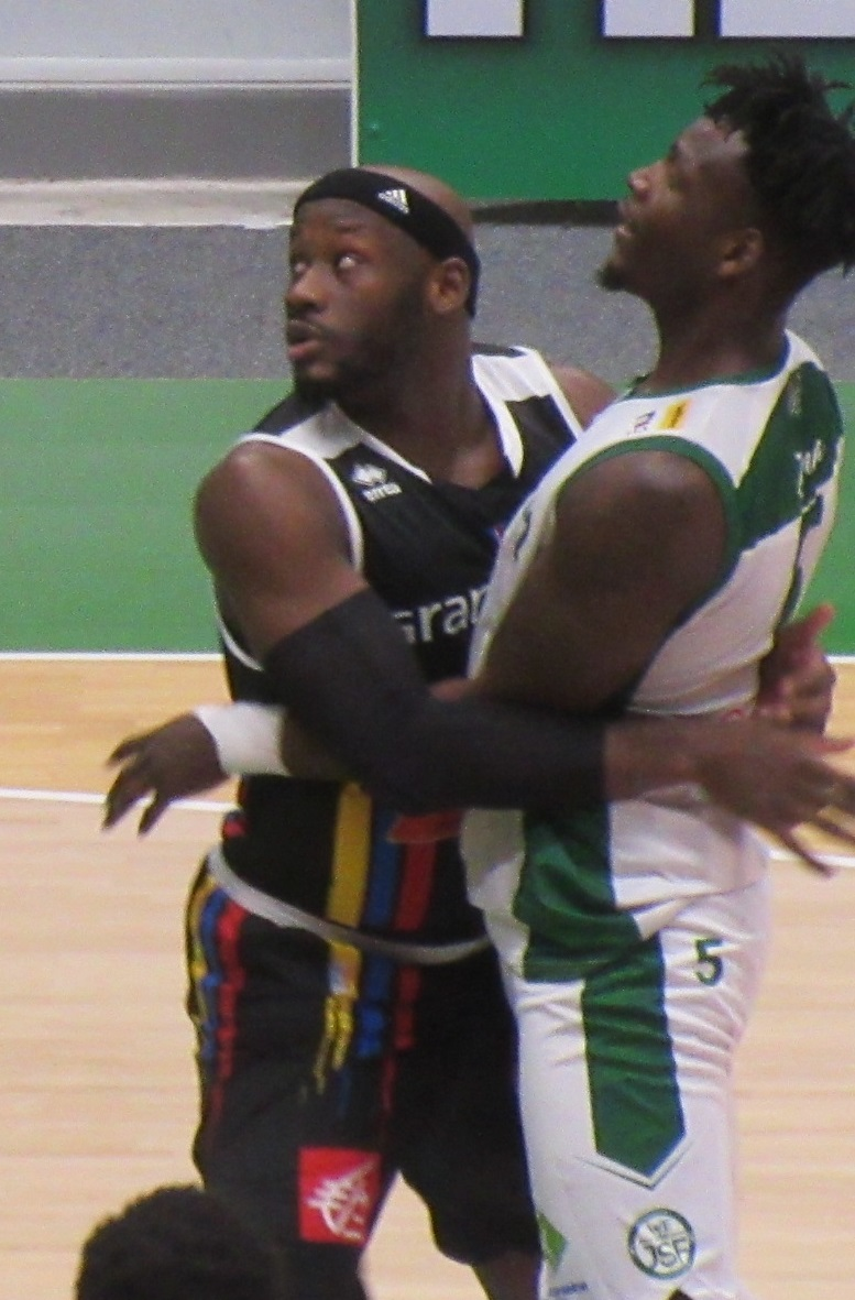 Johan Passave-Ducteil (avec le maillot de Dijon) est le joueur à gauche.